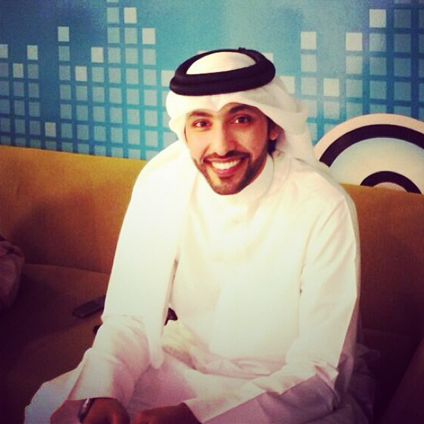 في مبنى إذاعة ألف ألف FM